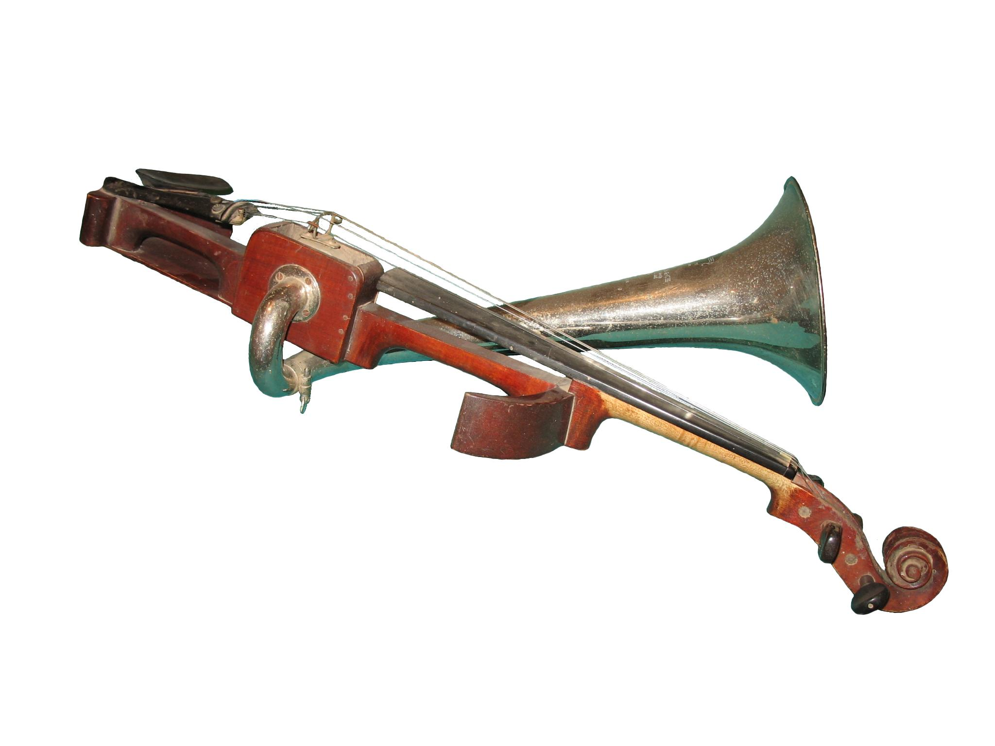 Violon de Jazz à pavillon de marque COUSNON, 1934